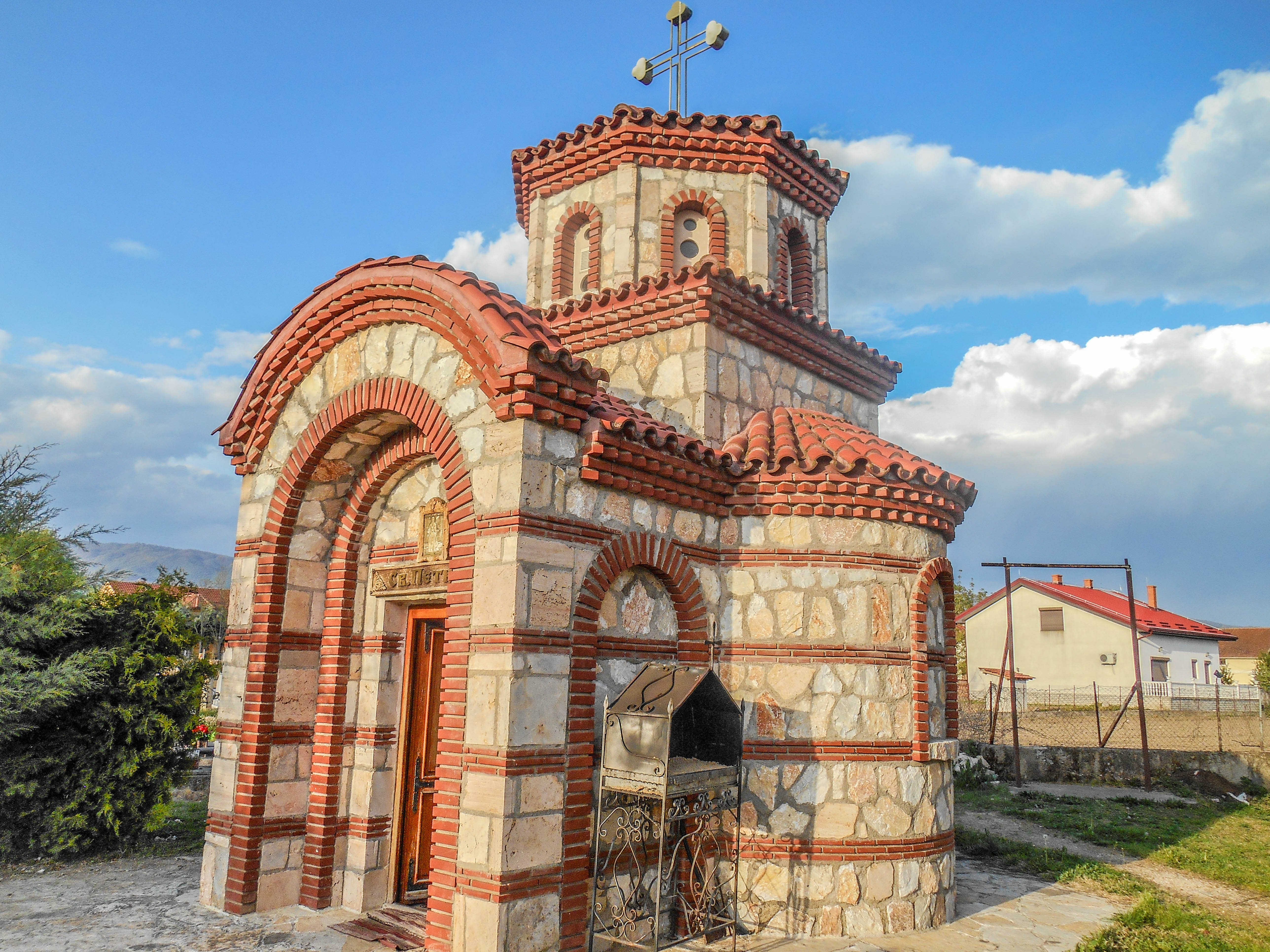 Црква „Св. Петка“ - Турново